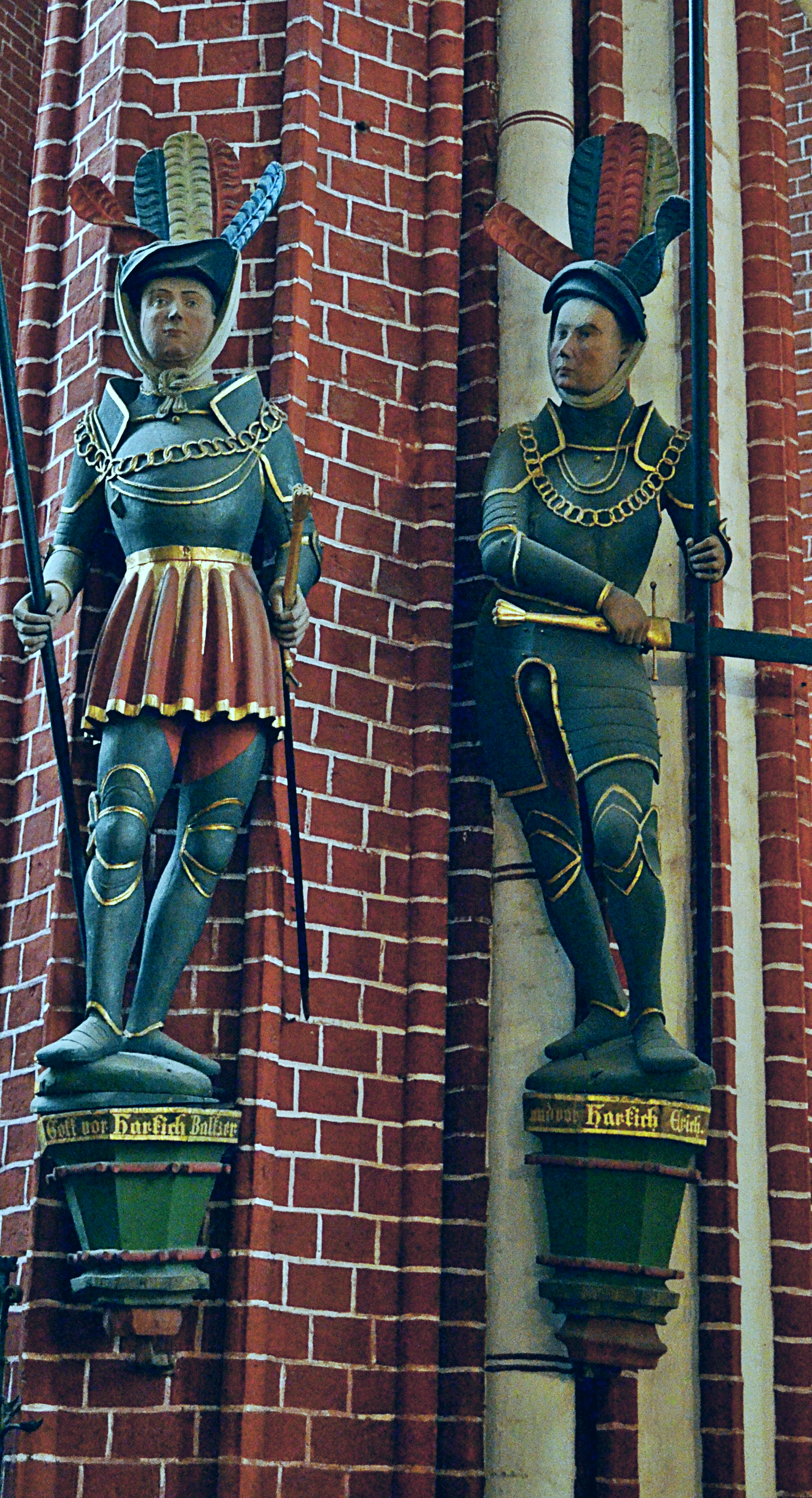 Bad Doberan, Münster, zwei Figuren